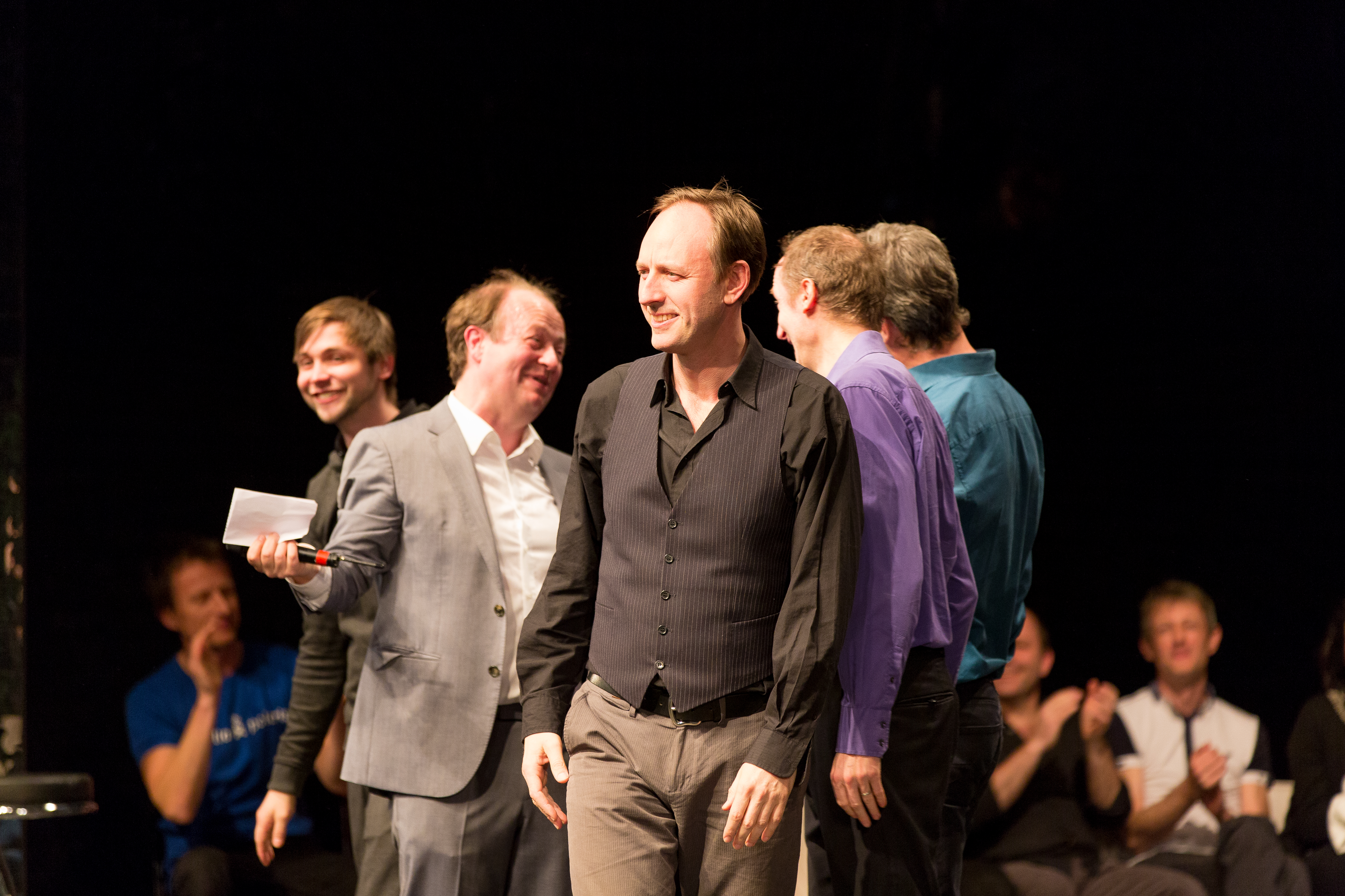 Mehrere Mitglieder des Ensembles Die Gorillas bei der Eröffnung ihres internationalen Festivals "IMPRO" im März 2014